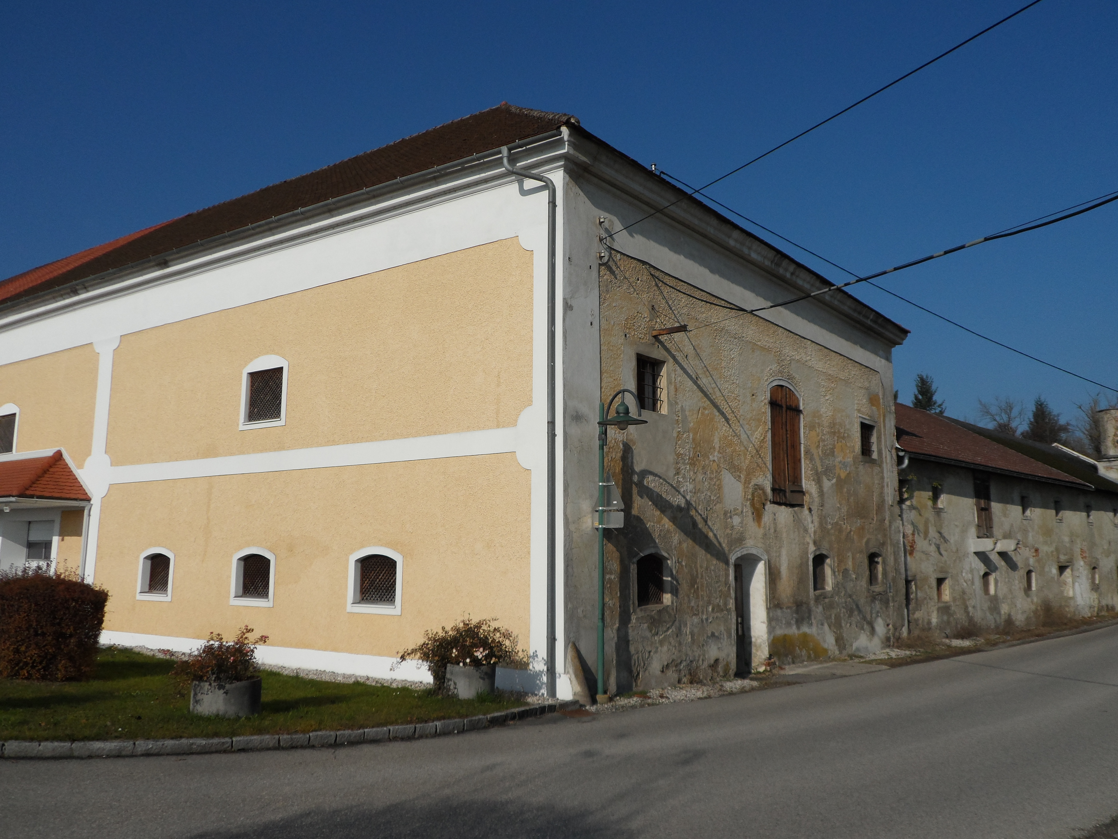 Teilweise renoviertes Wasserschloss Freiling